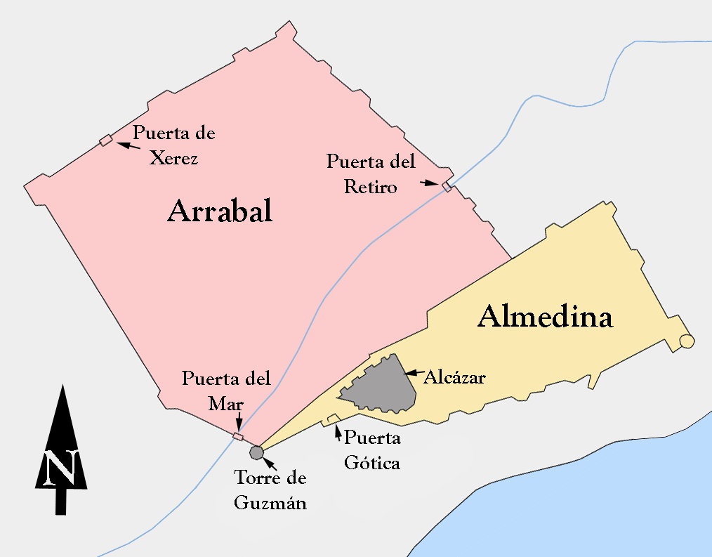 Situación de la medina de Tarifa (Andalucía, España) en el siglo XIV. Se observan los dos recintos amurallados (el Arrabal y la Medina) y el Alcázar así como las puertas conocidas de la villa.